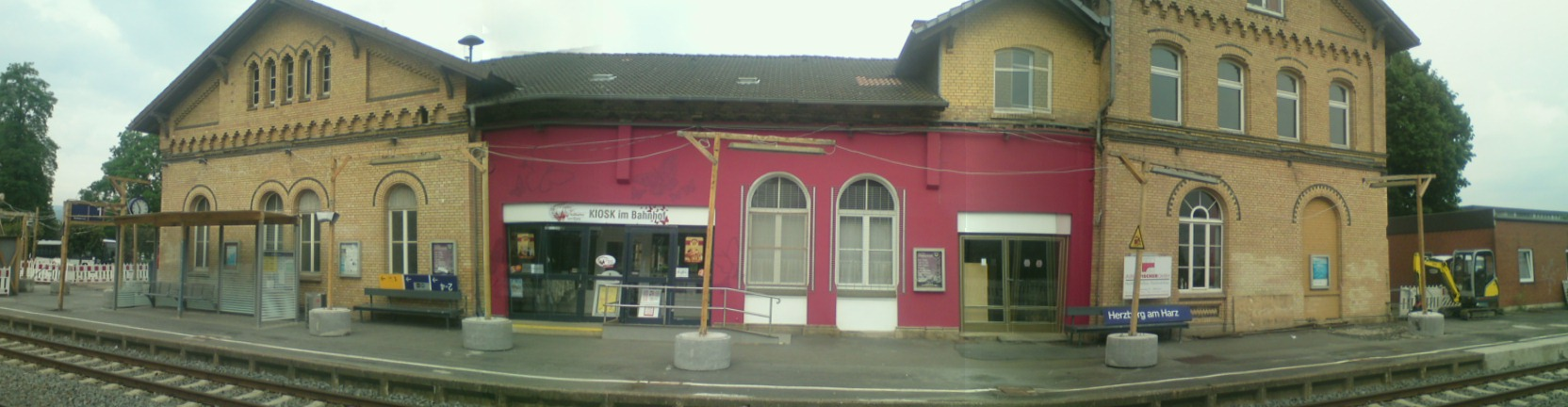 Vom Mittelbahnsteig aus fotografiert